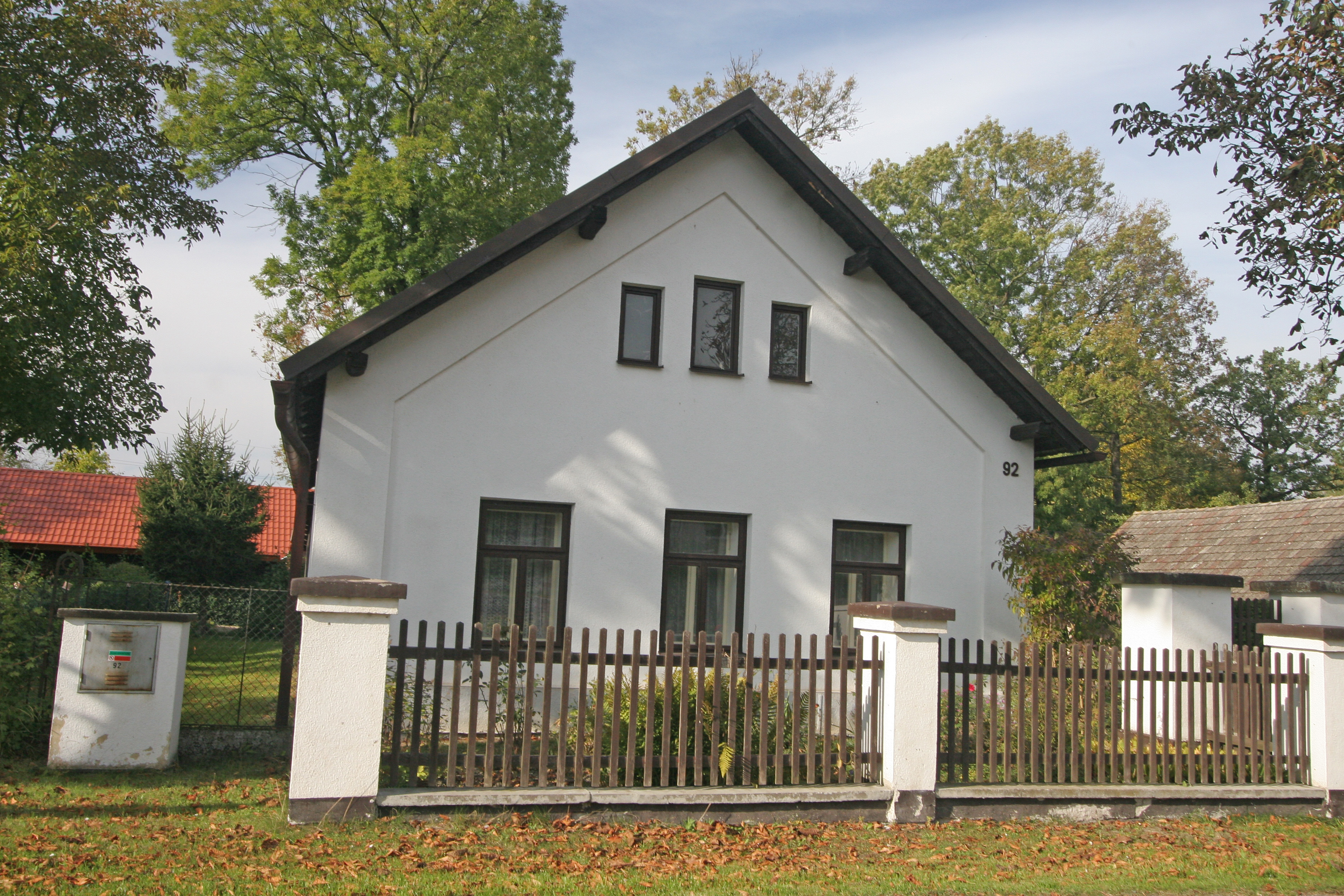 Librantice čp. 92